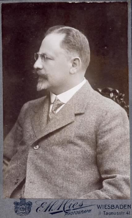 Rådmannen Embleton Sundberg